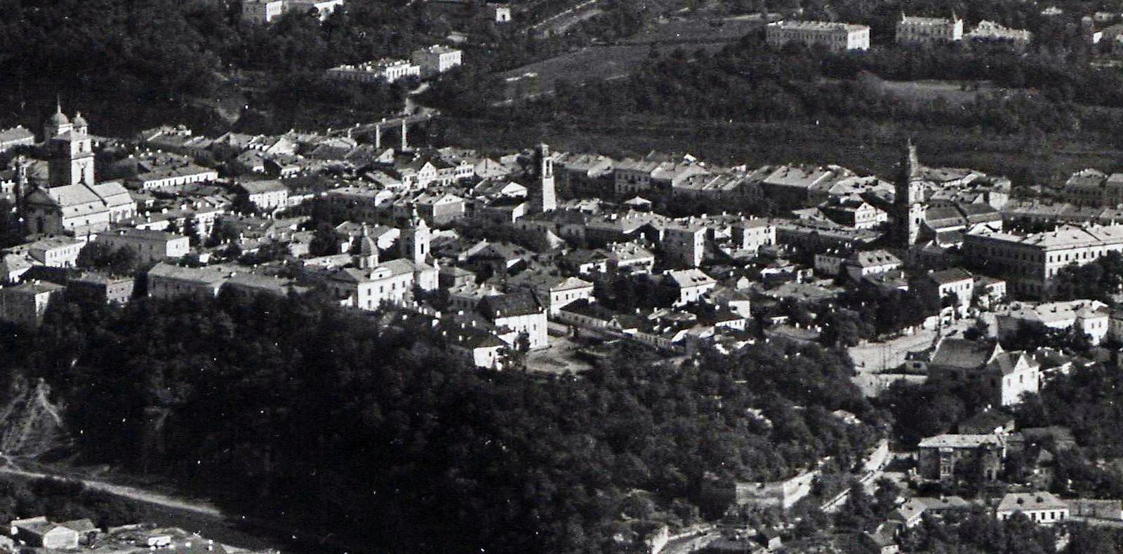 Каменец-Подольский с высоты птичьего полёта (начало XX века), до 1922